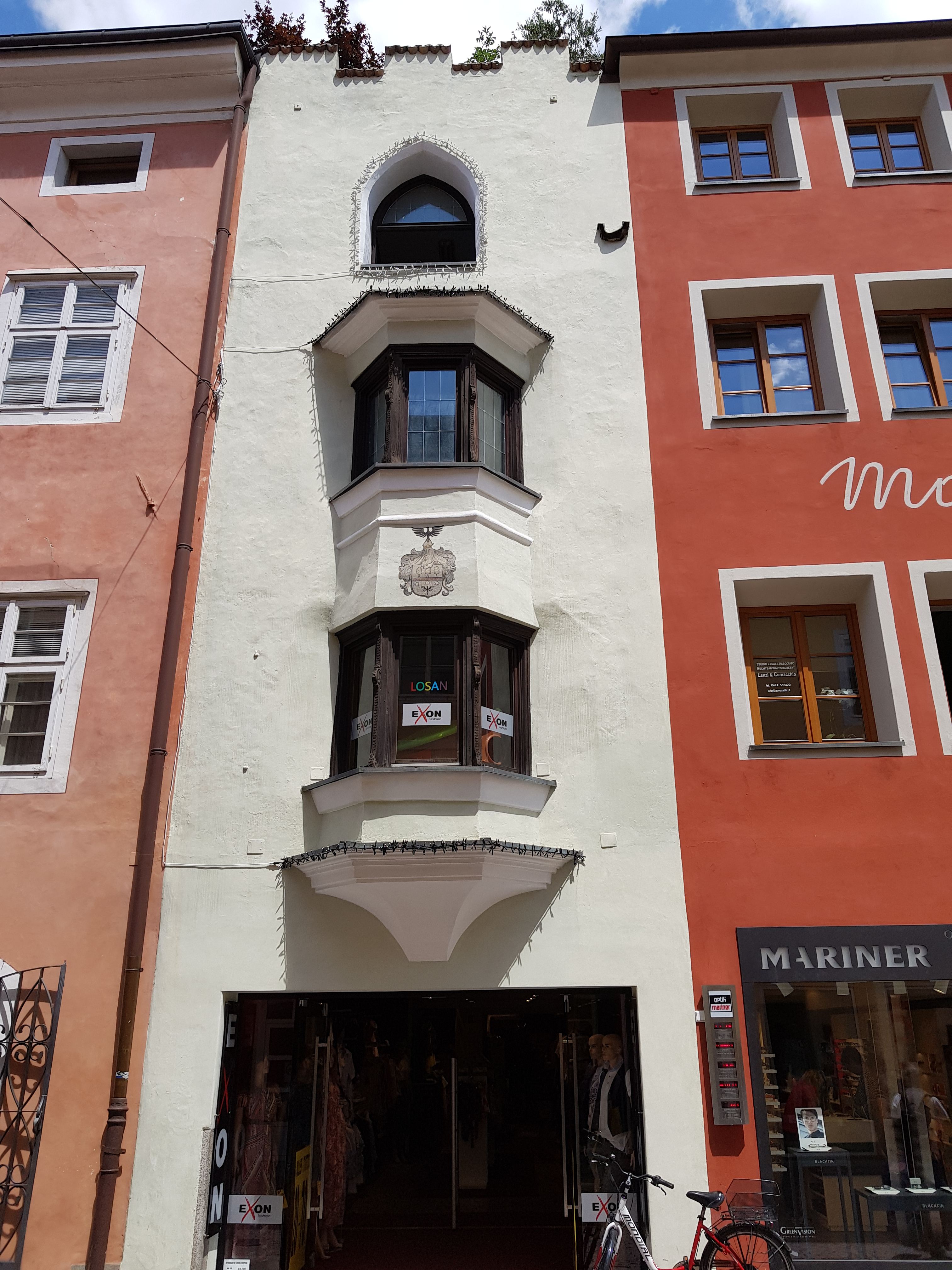 Haus Stadtgasse 27, Bruneck, Südtirol